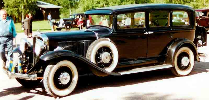 Studebaker President Series 90X Eight 7-Passenger Sedan 1931